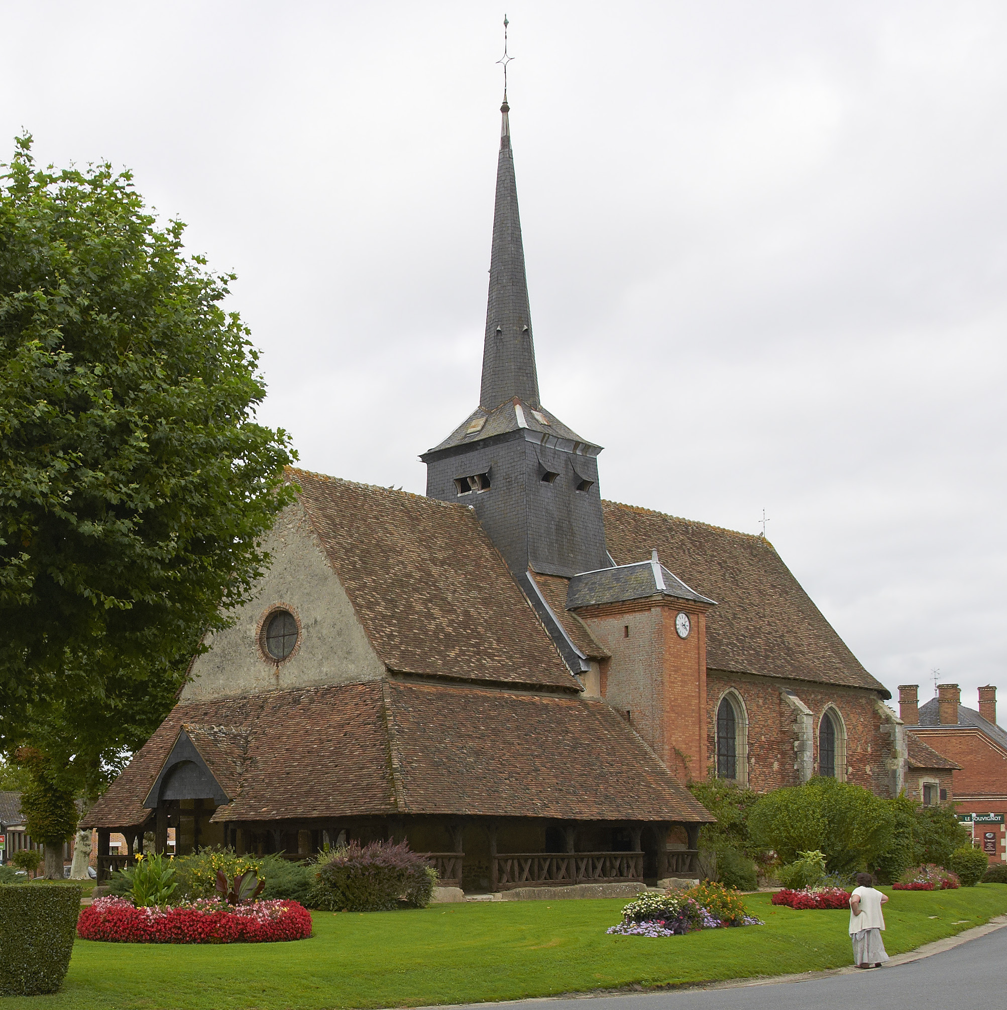 Église Saint-Martin de Souvigny-en-Sologne, France